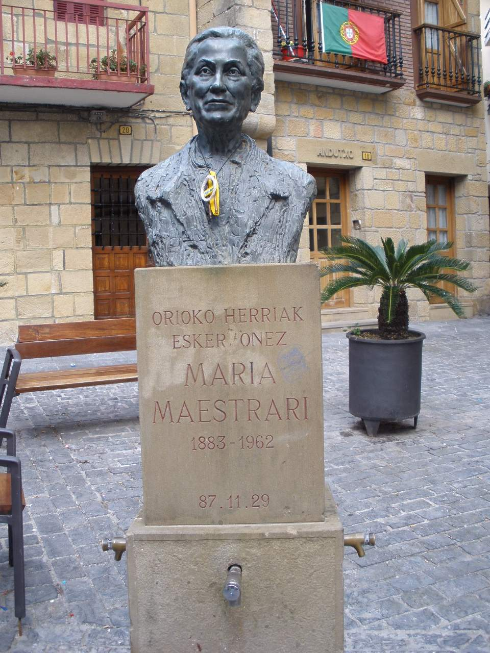 Orio (Gipuzkoa)